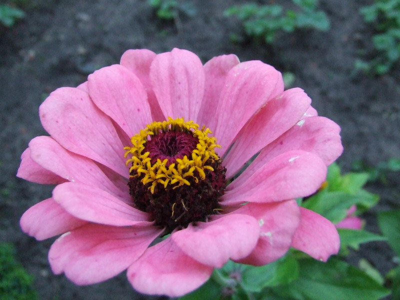 Zinnia elegans. Veseluvka, Jonava district, Lithuania.